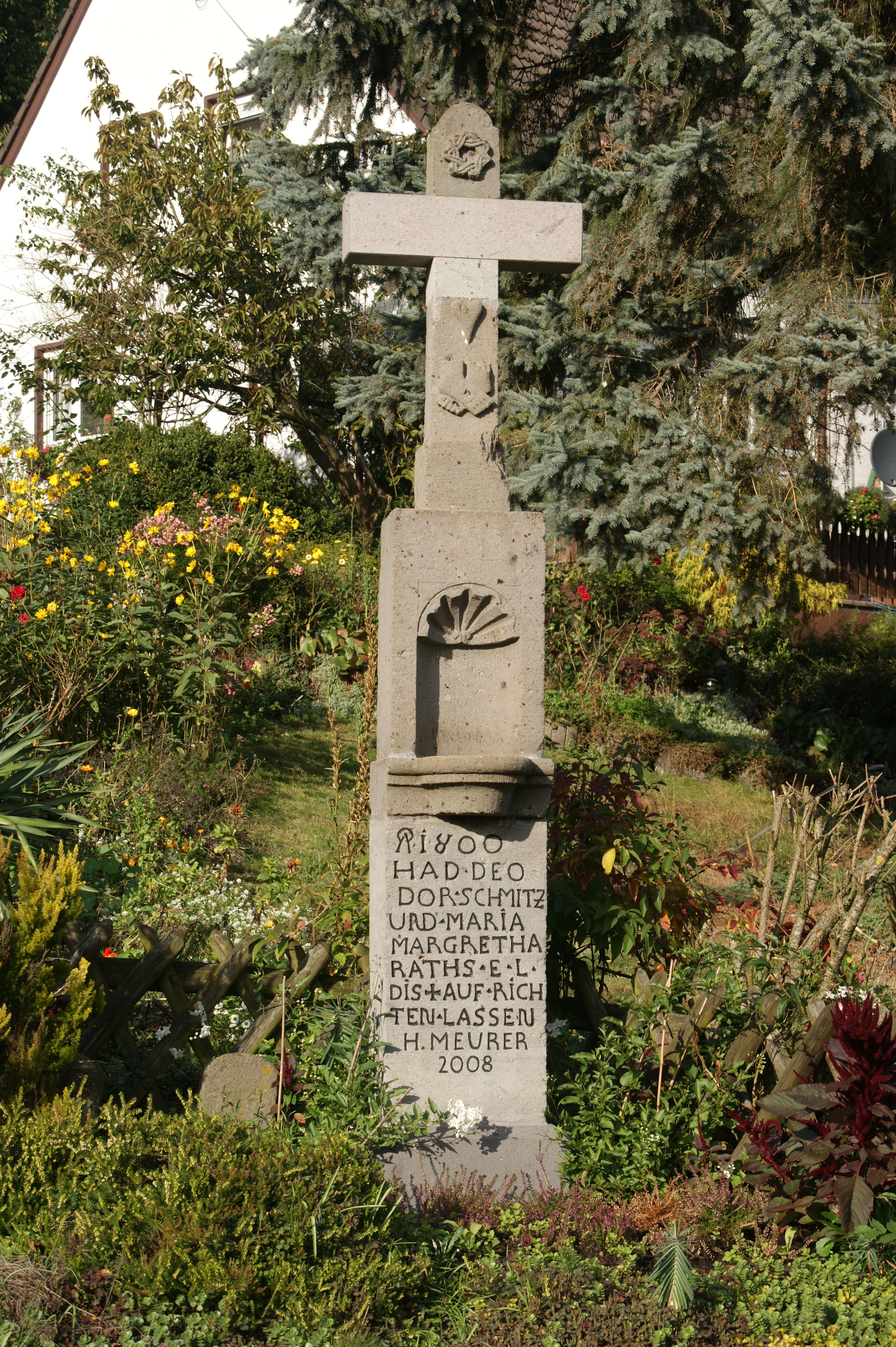 Wegekreuz in Königswinter-Hartenberg